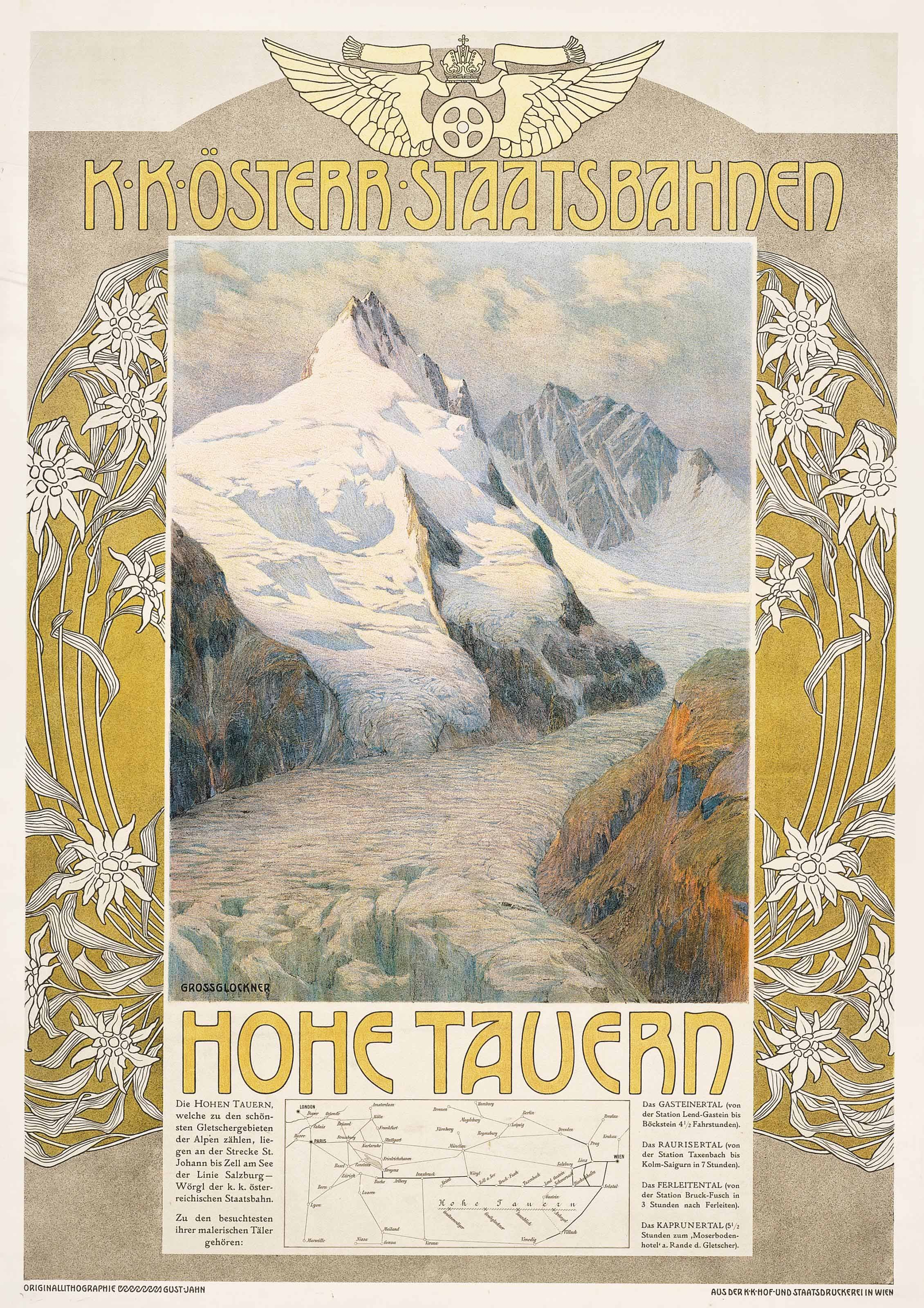 aus der K.K Hof- und Staatsdruckerei in Wien (Werbung für die K.K Österr. Staatsbahnen)